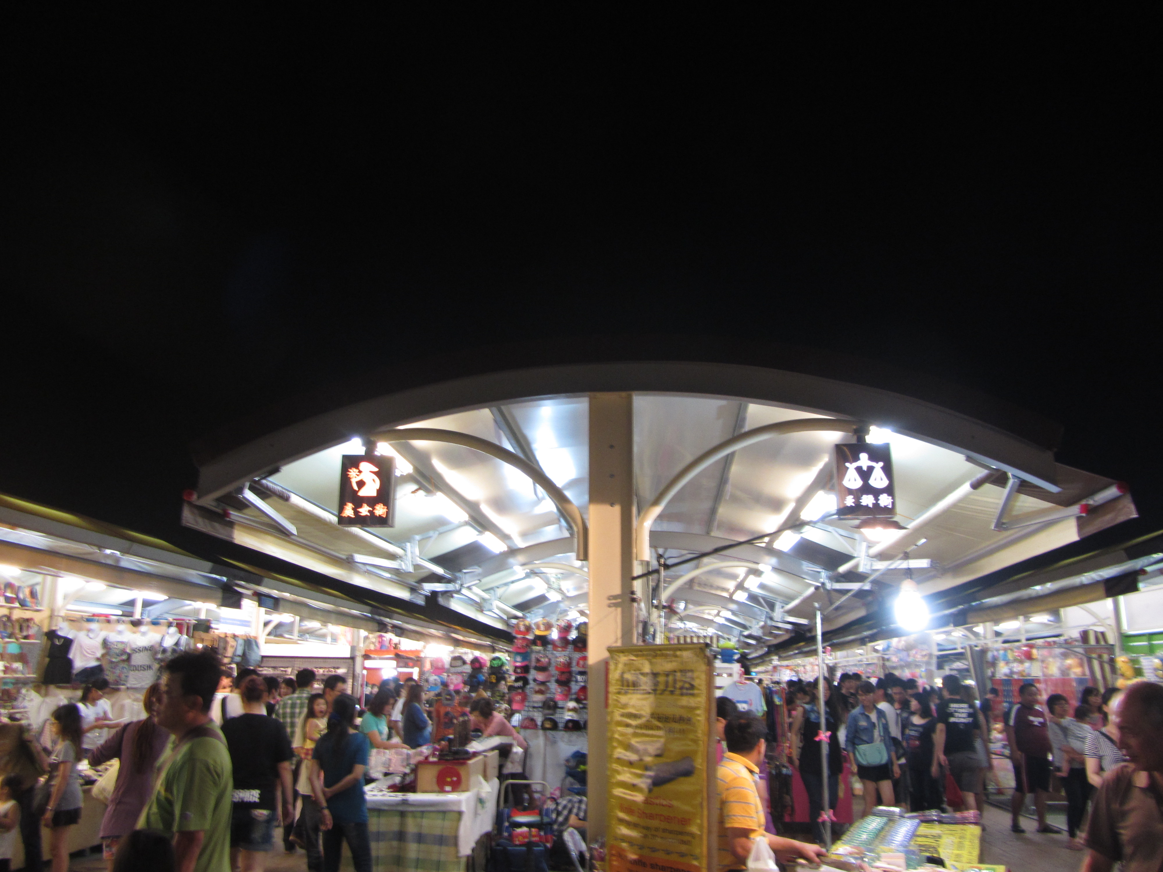 金鑽觀光夜市內的走道